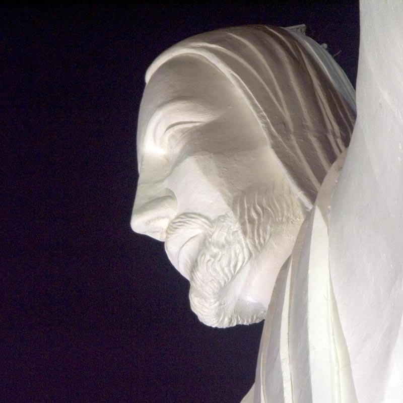 Detalle de la cabeza del Cristo de las Noas en Torreón, Coahuila, México, tomada en Abril de 2005. Resolución 800x800 píxeles. Category:Comarca Lagunera Category:Torreón Category:Coahuila Category:México